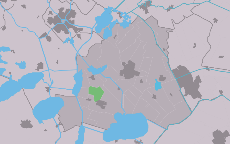 Kaartsje fan himrik fan Legemar